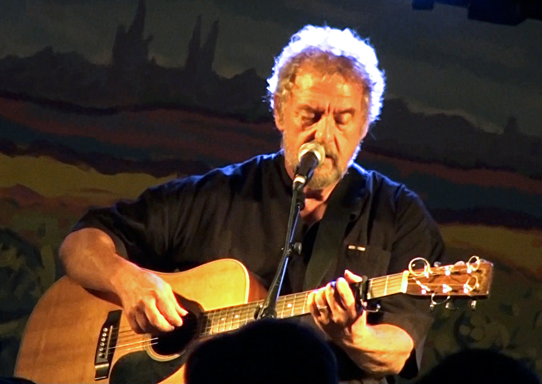 Gilles Servat en concert à Saint-Pol-de-Léon (29) lors du festival Kastell Paol le 18 juillet 2010.